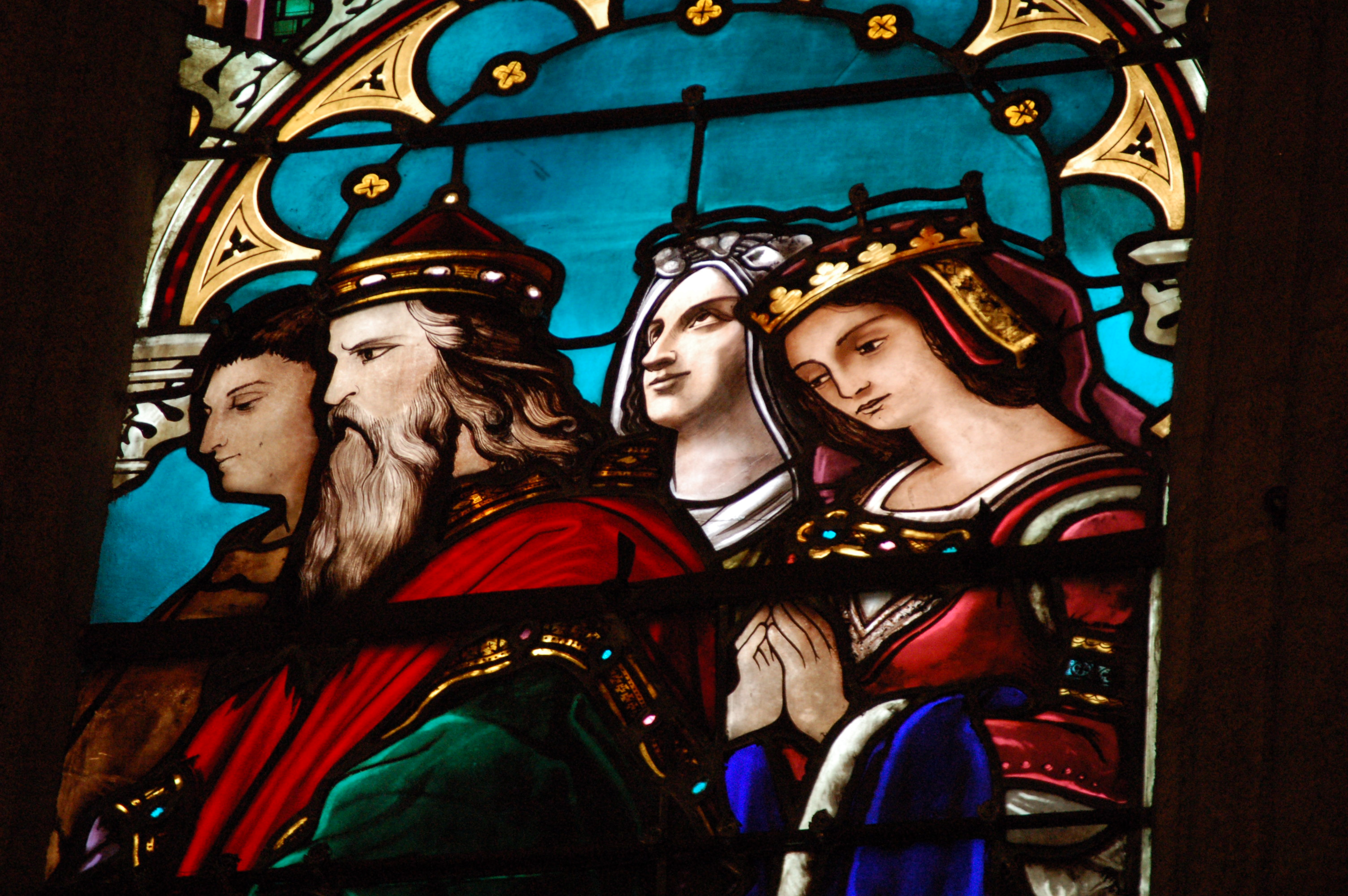 Détail d'un des vitraux de l'église Saint-Michel-des-Lions à Limoges